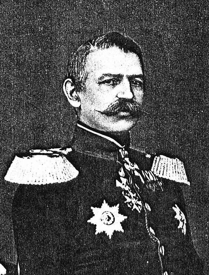 Hermann von Alvensleben (1809-1987)